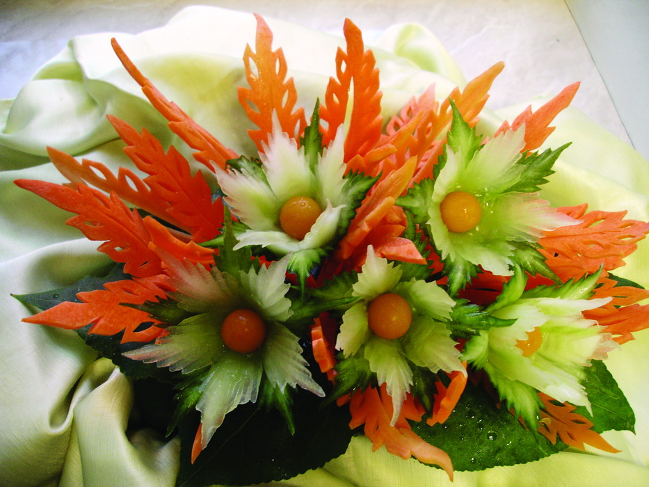 Карвинг-композиция